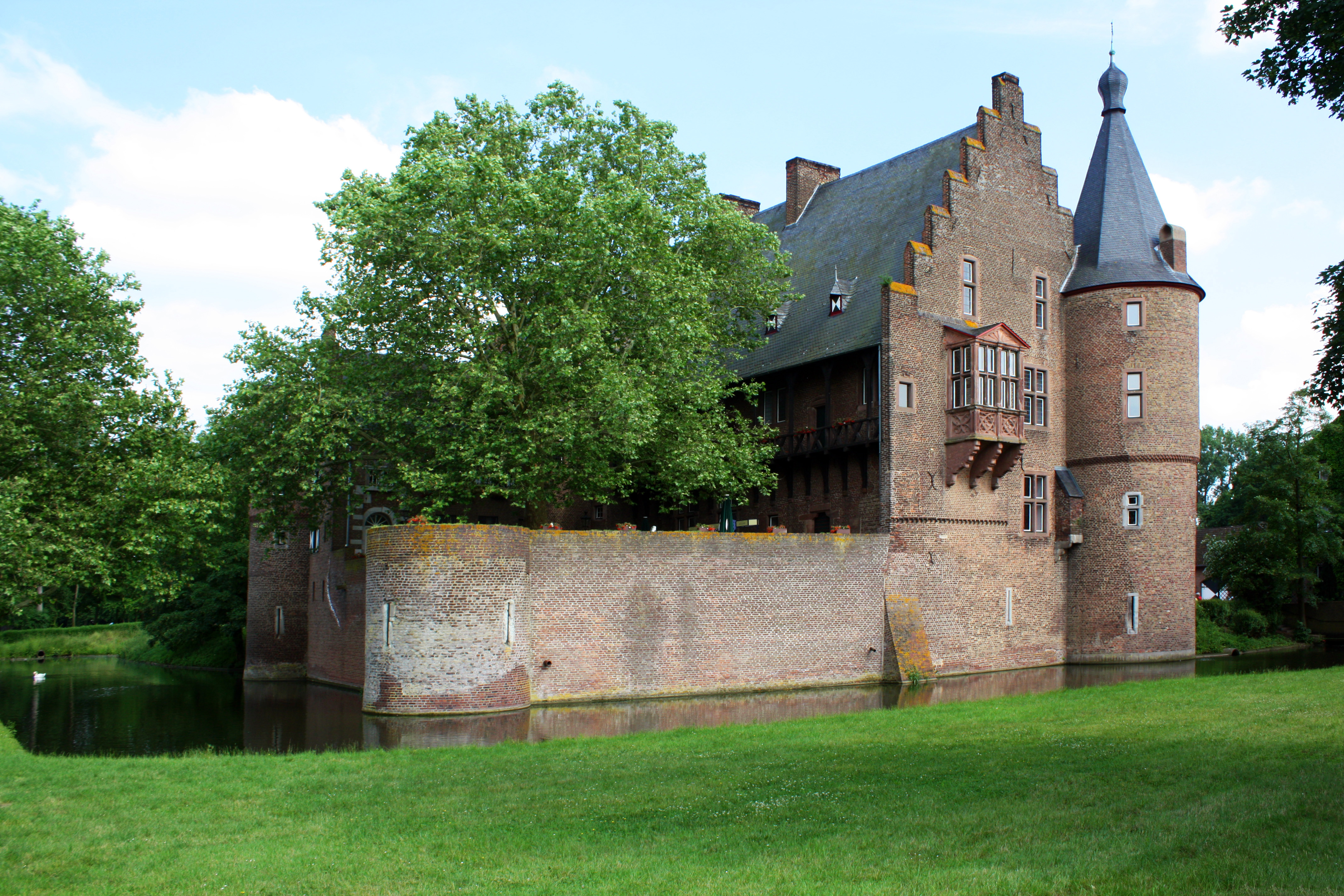 Burg Konradsheim, Erftstadt. Westseite